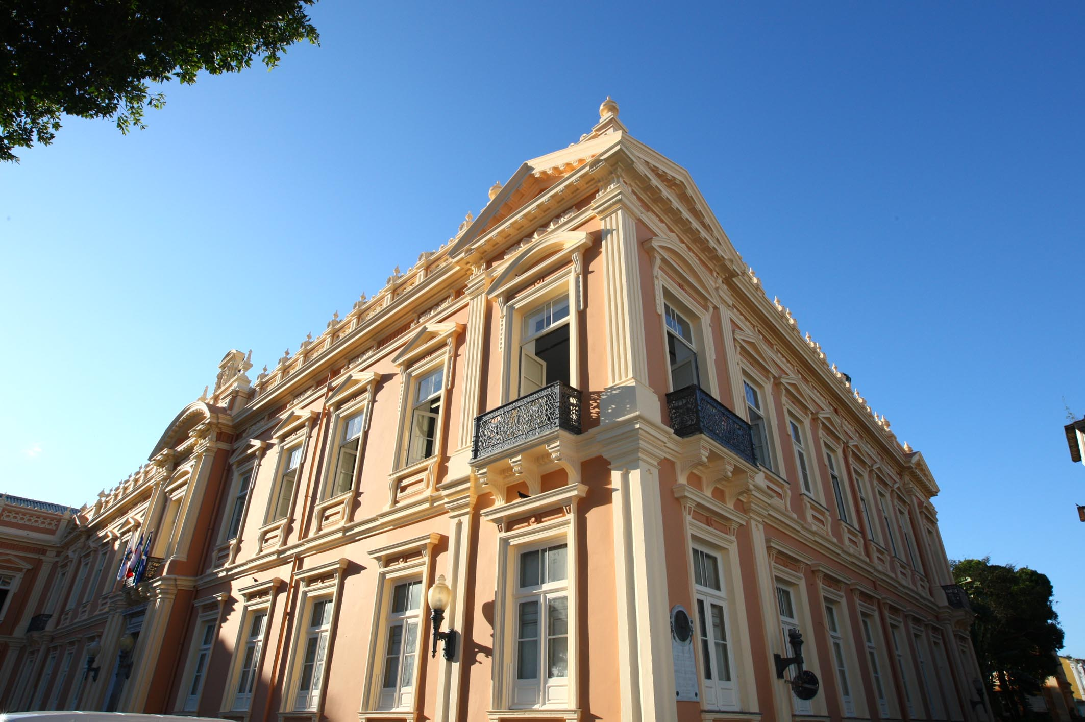 A Ala Nobre da Faculdade de Medicina da Bahia (Fameb), no Centro Histórico.